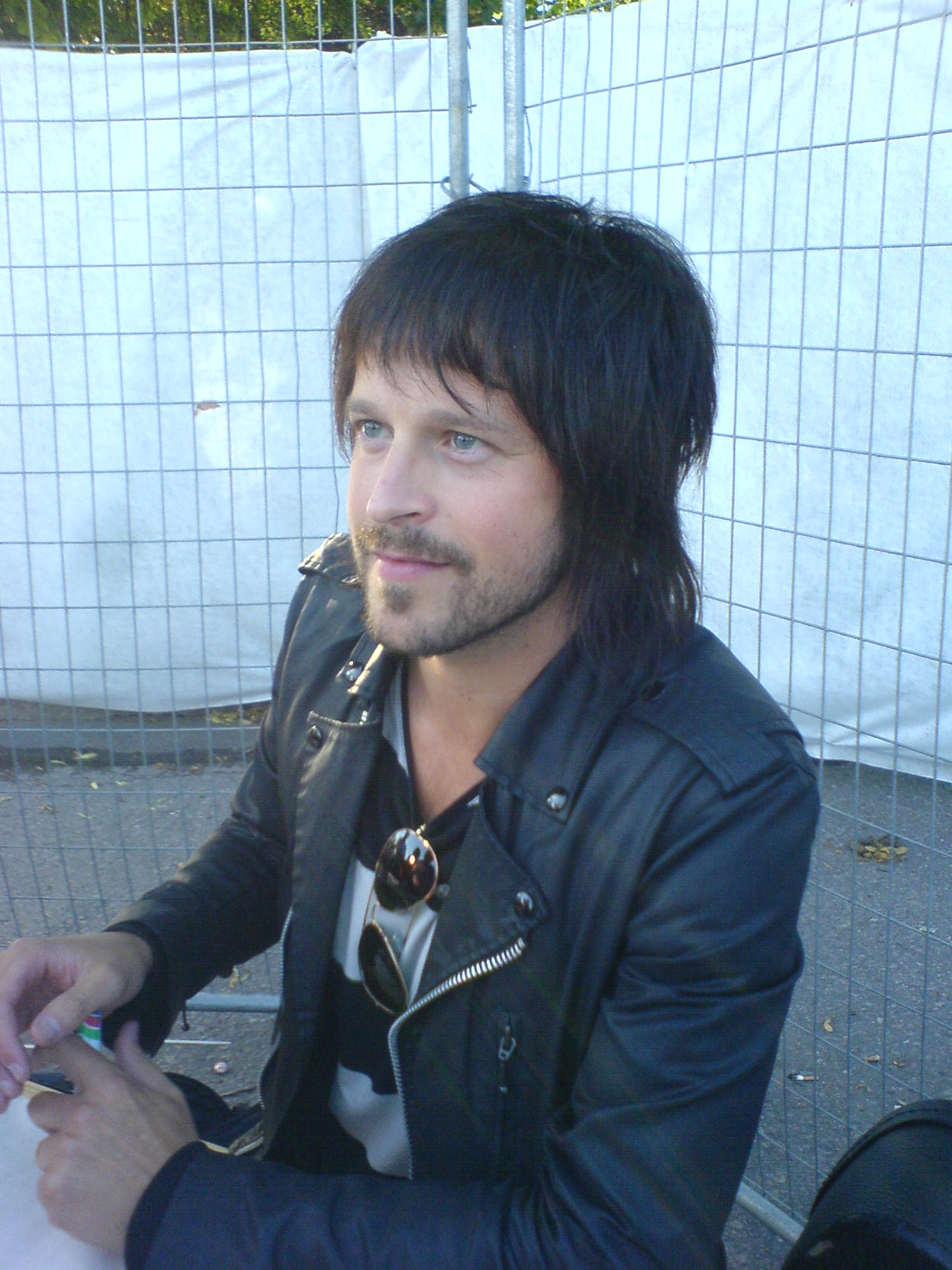 Karl Martindahl vid skivsignering på Vätternfestivalen i Motala